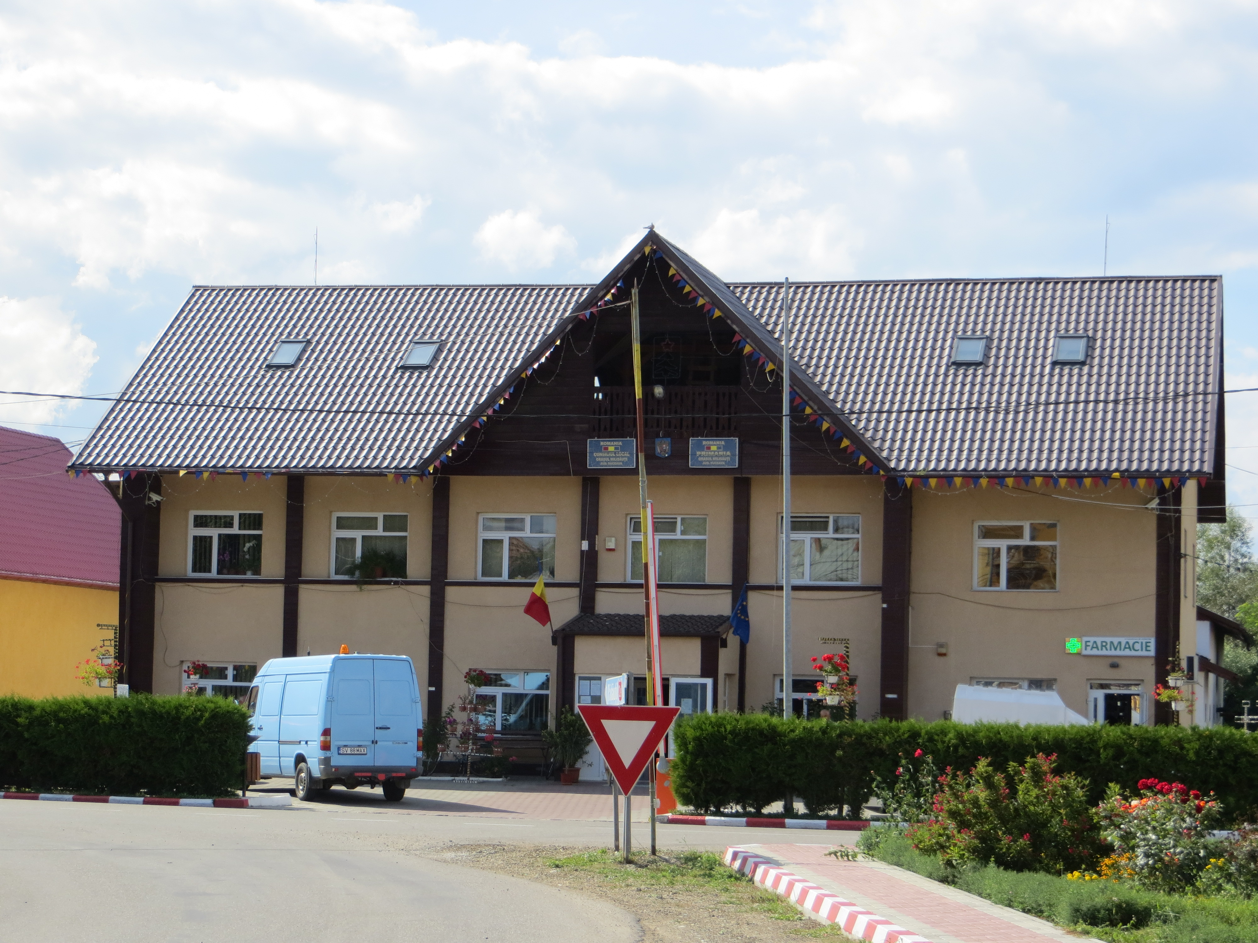 Centrul orașului Milișăuți, județul Suceava, România.